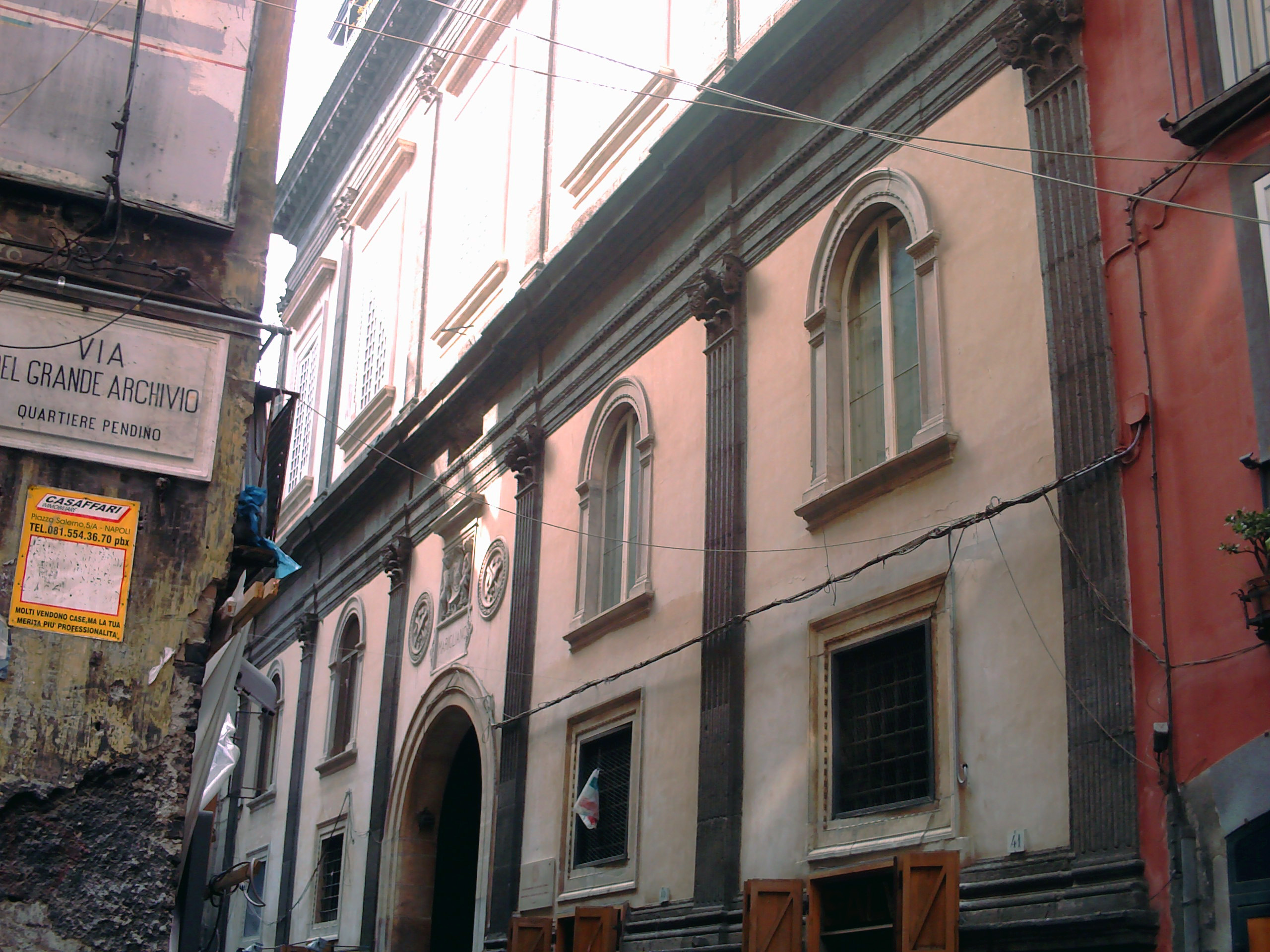 Palazzo Marigliano